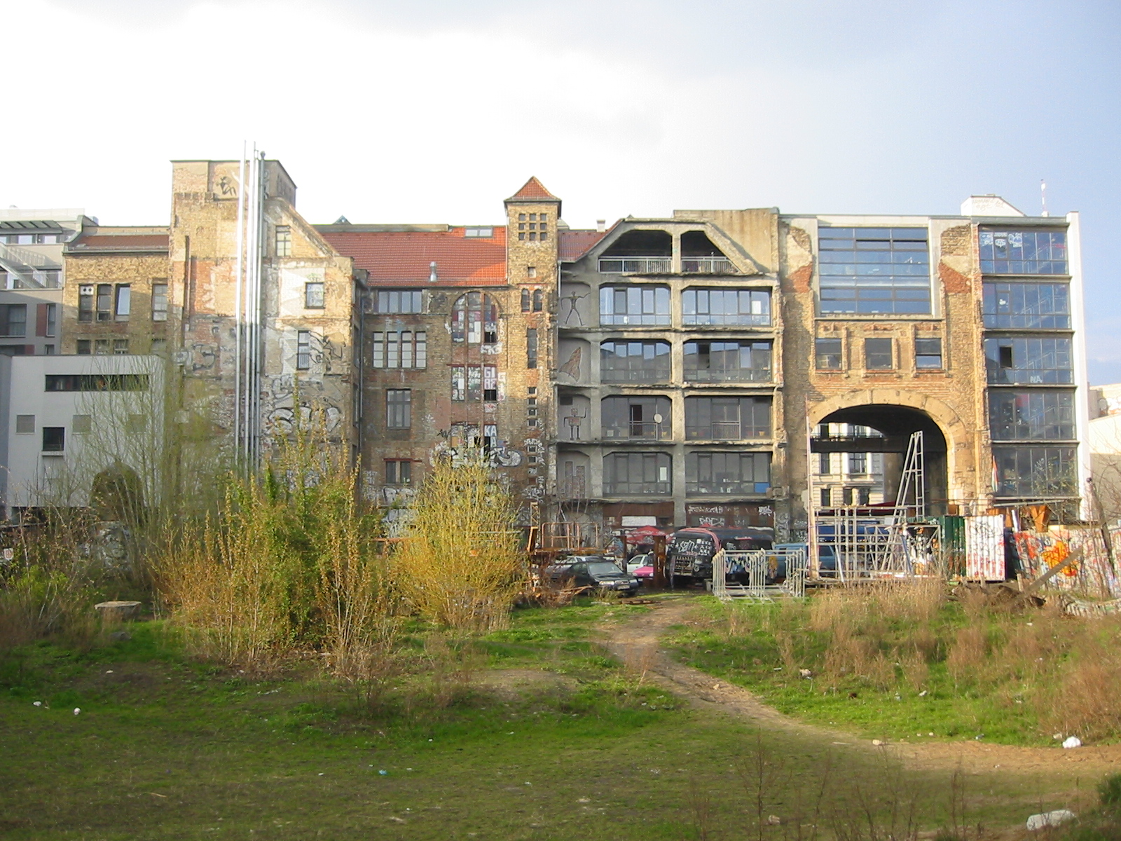 Kunsthaus Tacheles, Berlin, Backside